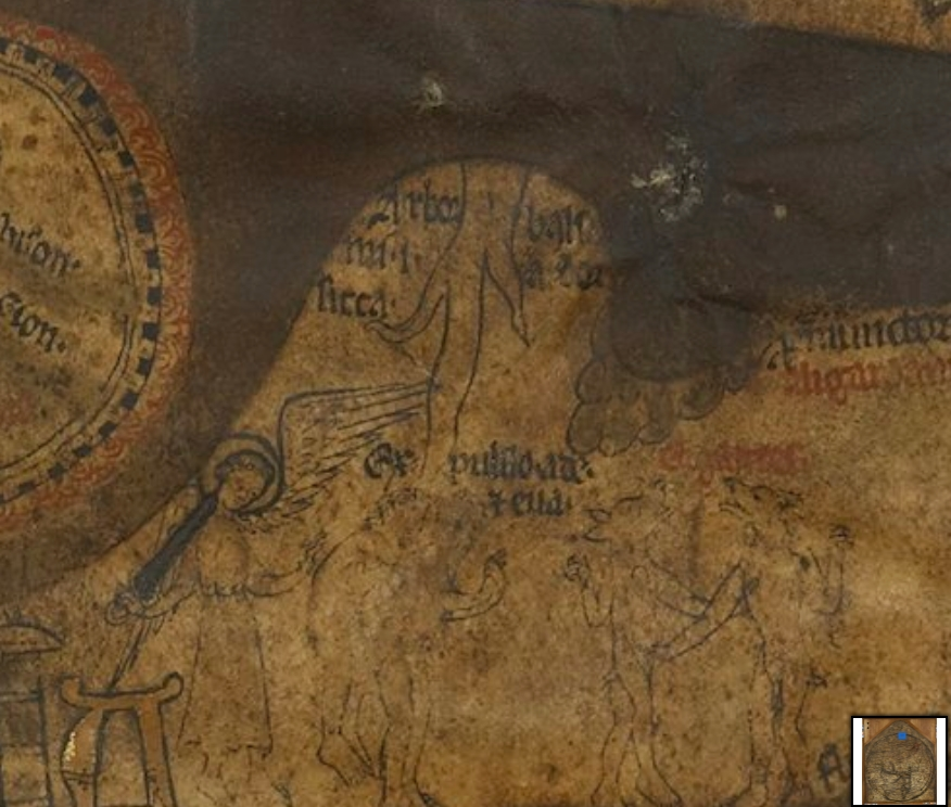 Prise de vue cadrée et centrée sur l'"Arbor Sicca" de la carte d'Hereford